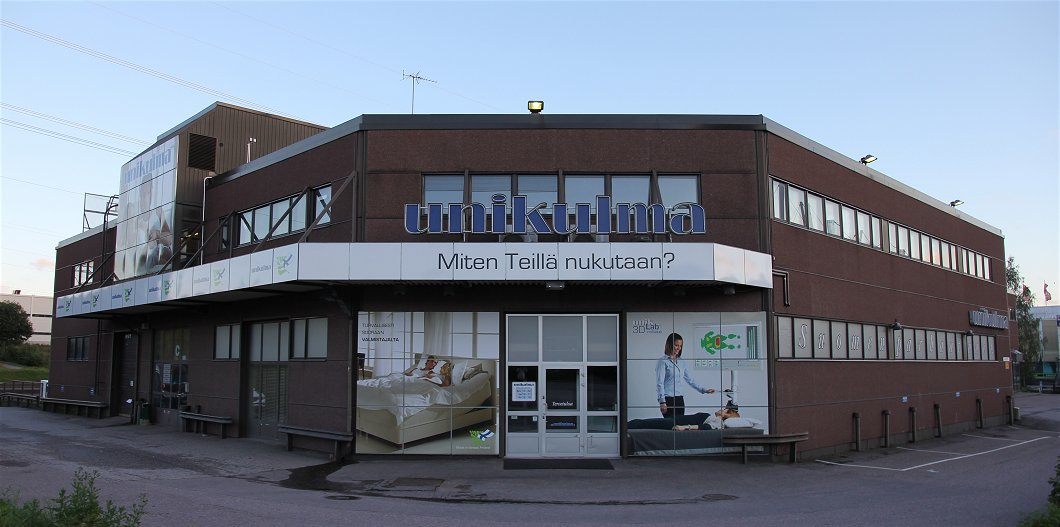 Unikulma Oy:n Vantaan Petikon rakennus (käyntiosoite Petikontie 1, 01720 Vantaa). Unikulma on suomalainen vuonna 1985 perustettu, yksilöllisiä vuoteita ja näihin liittyviä ratkaisuja valmistava ja myyvä perheyritys.